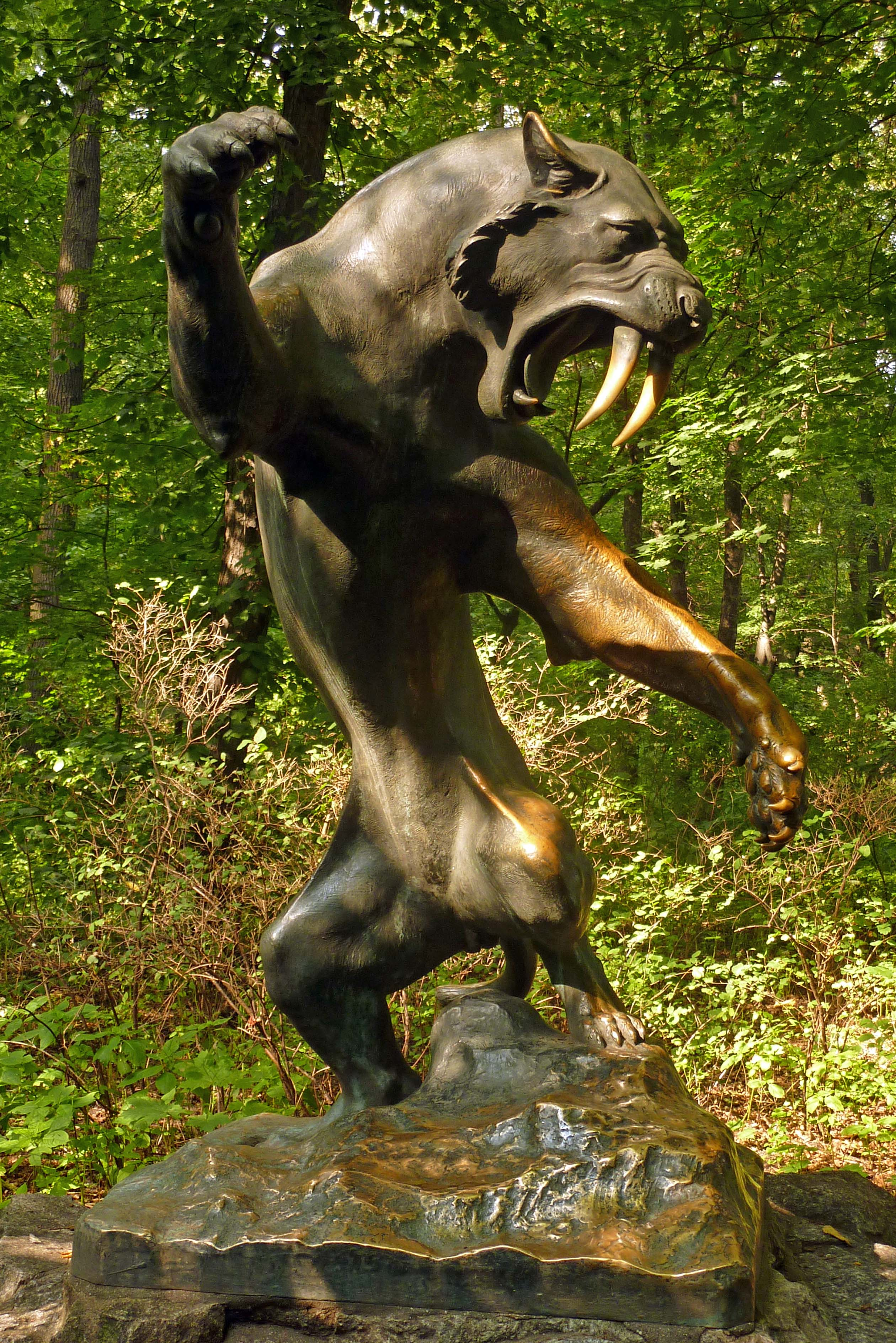 Lebensgroße Bronzeskulptur 'Säbelzahnkatze' von Erich Oehme aus dem Jahr 1964. Aufgestellt 1965 im Tierpark Berlin (Friedrichsfelde) nördlich der Freilichtbühne. Darstellung einer Pampas-Säbelzahnkatze Smilodon neogaeus (Lund 1839).